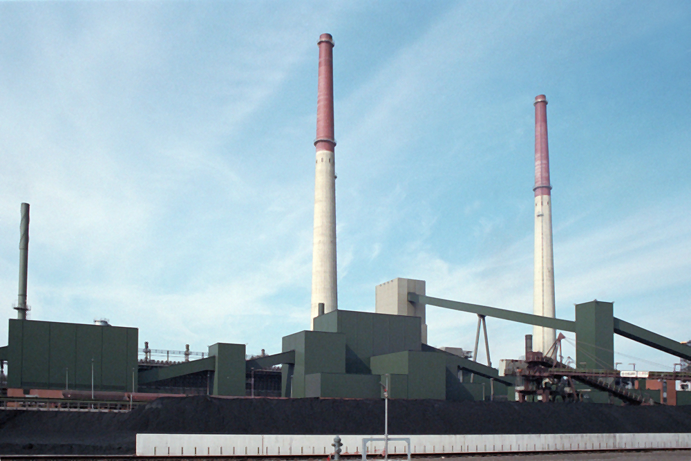 Ofenbetrieb der Kokerei Kaiserstuhl 1996